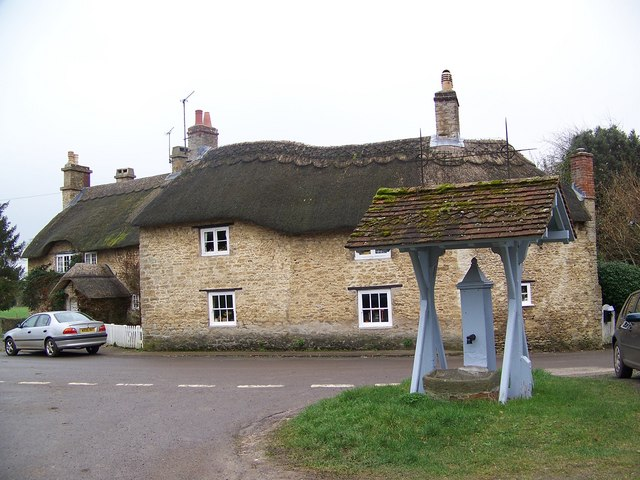 Village Pump, Lullington